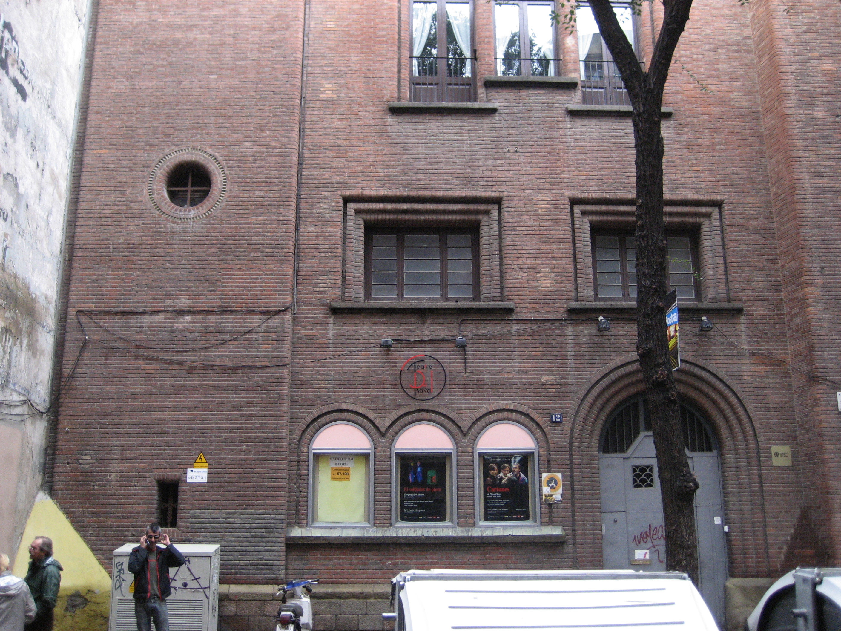 Teatre del Raval, façana (ubicat al antic teatre de l'església del Carme)